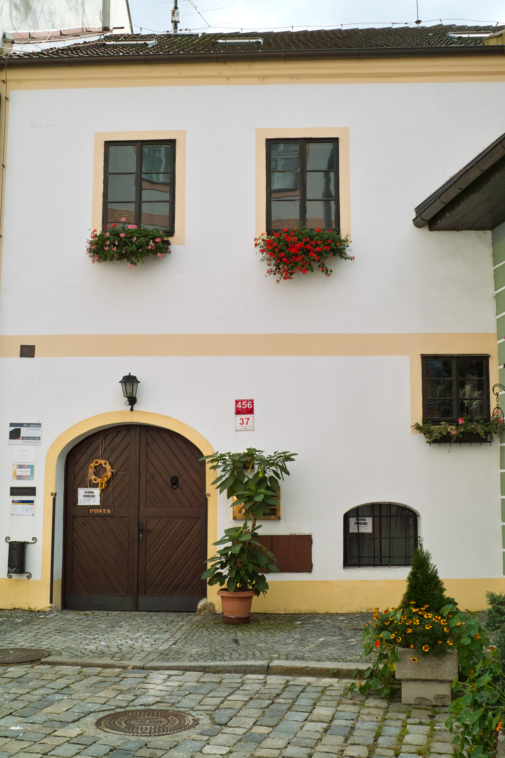 Široká 37, měšťanský dům s gotickým srubem, České Budějovice